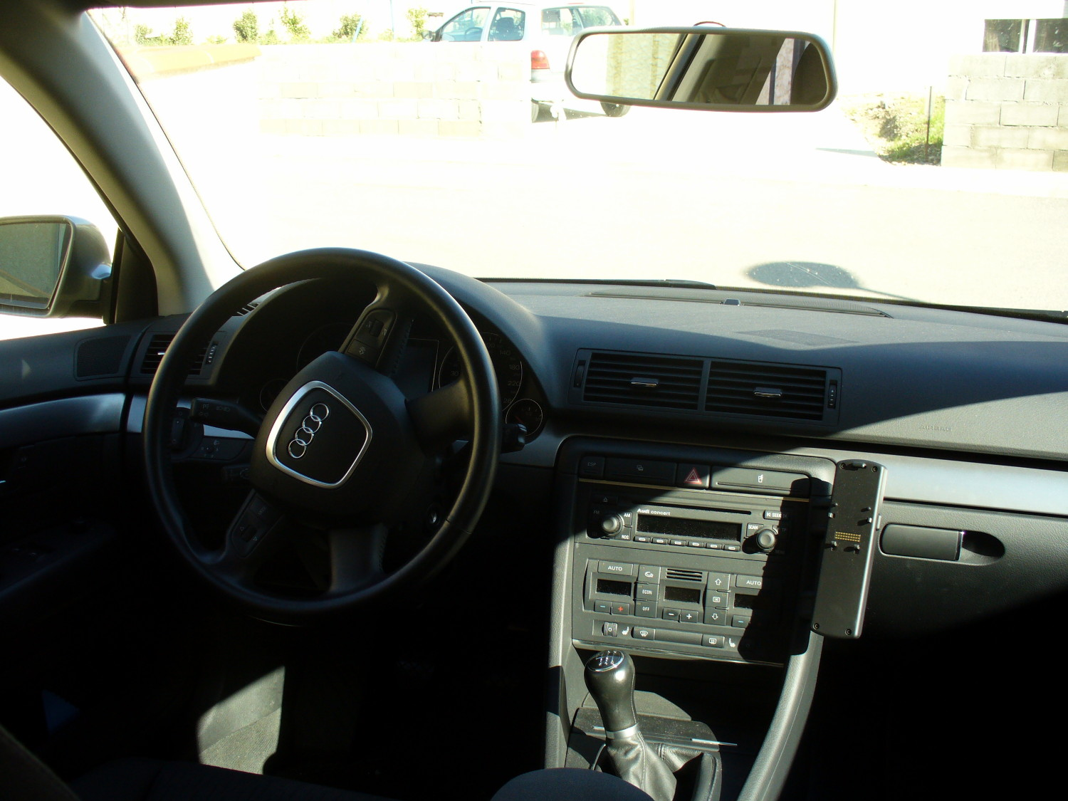 Audi A4 B6 Avant